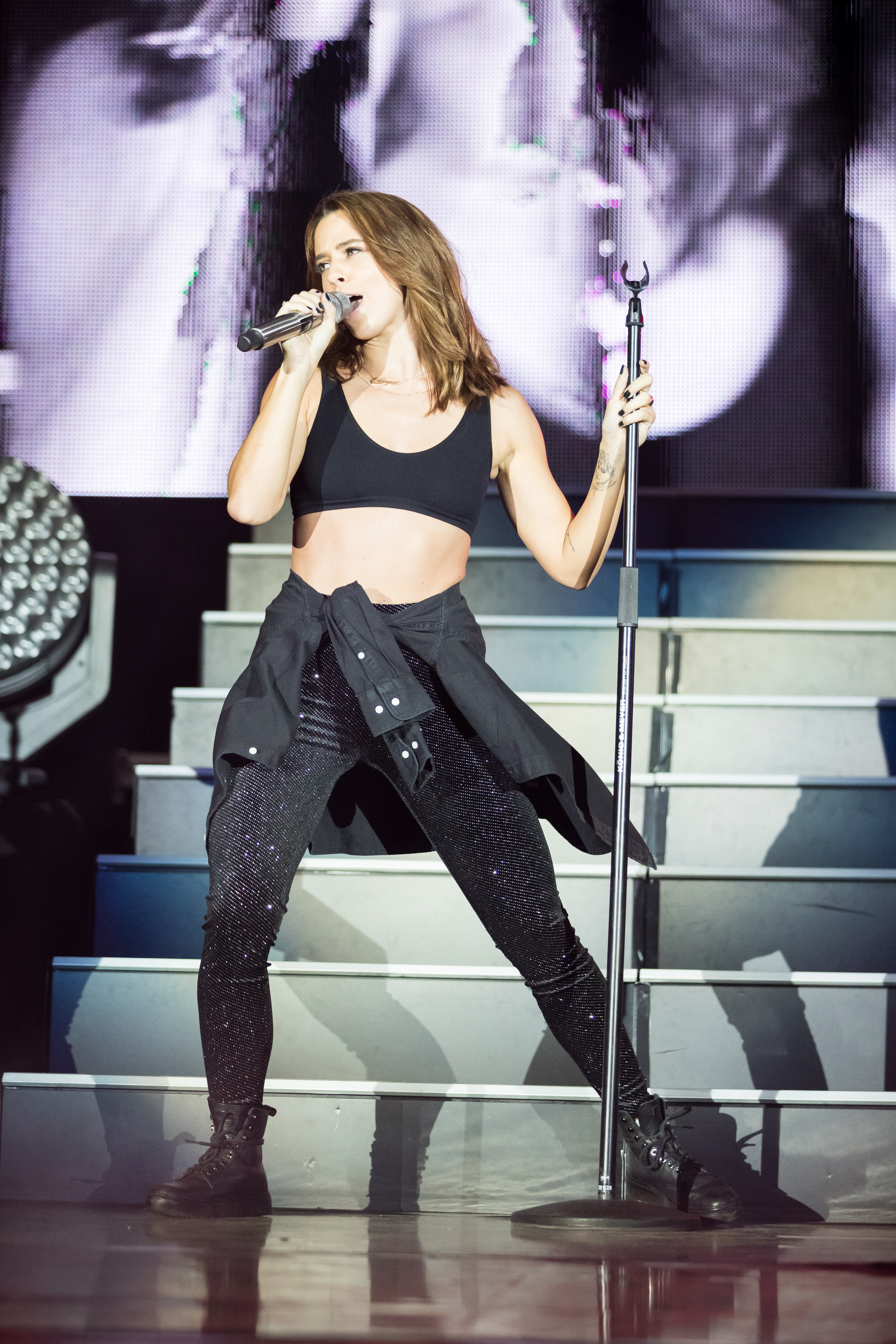 Vanessa Mai during Die Schlagernacht des Jahres at Hanns-Martin-Schleyer-Halle, Stuttgart, Baden-Württemberg, Germany on 2018-10-13, Photo